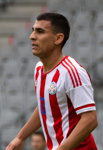 Júnior Alonso